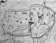 Document cartographique représentant le centre de la ville de Troyes dénommée le "Bouchon de Champagne". Réalisé par Jourdain de Rochefort, en 1778. Document conservé aux archives départementales de Troyes cote 21H1.